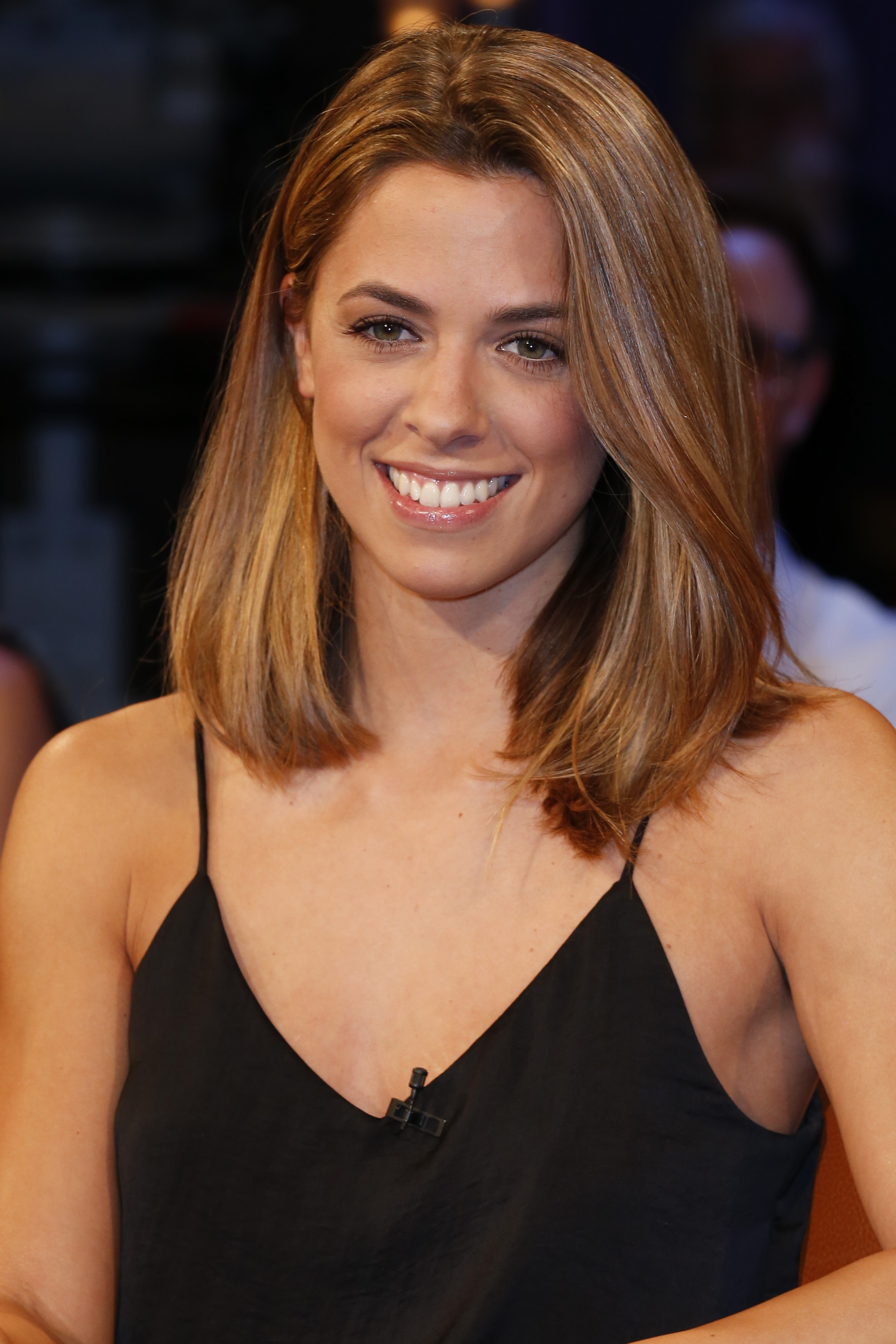 Vanessa Mai bei der NDR Talk Show am 03.06.2016 Foto; Jan-Timo Schaube